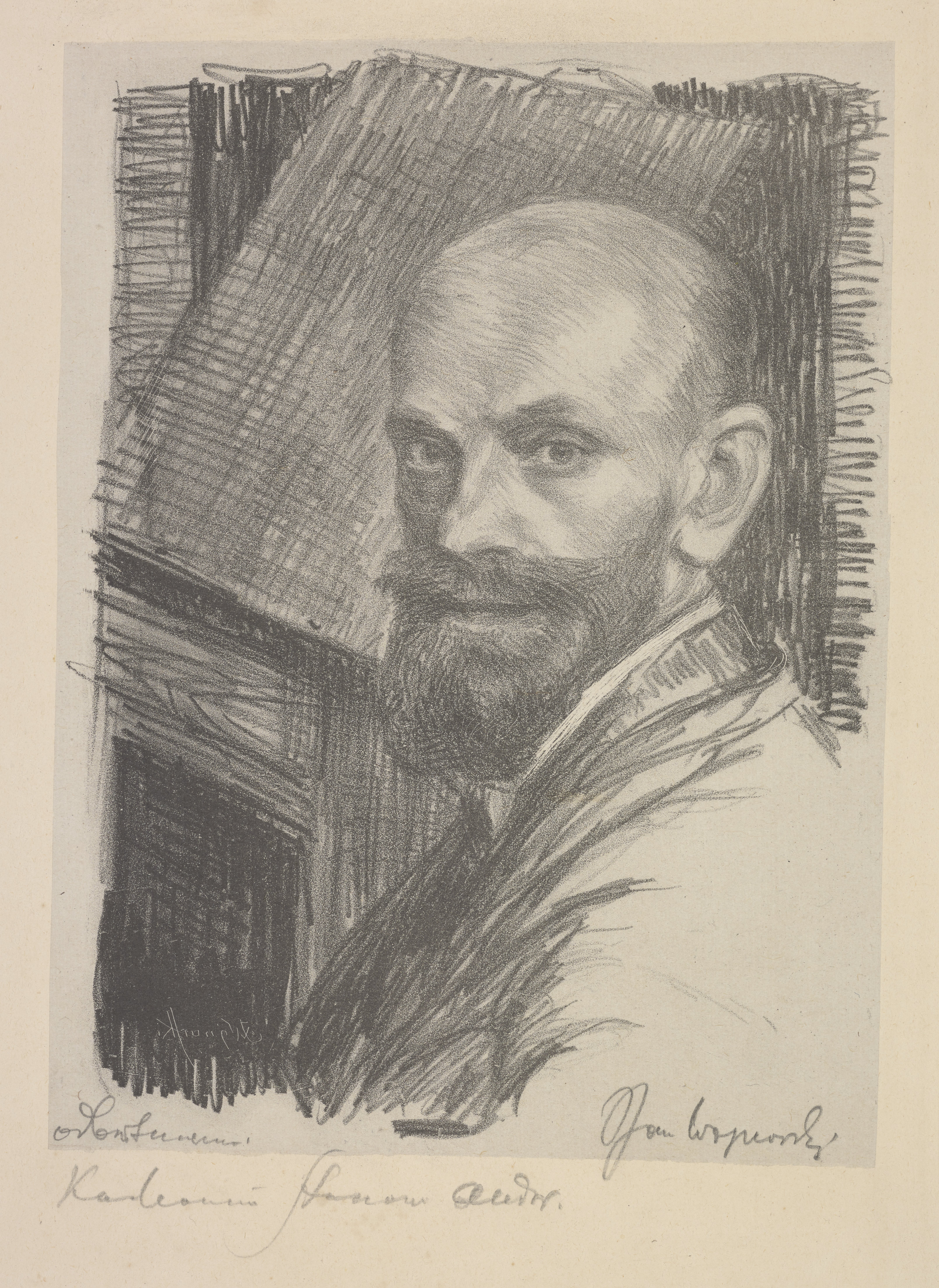 Jan Wojnarski, ok. 1925 r.